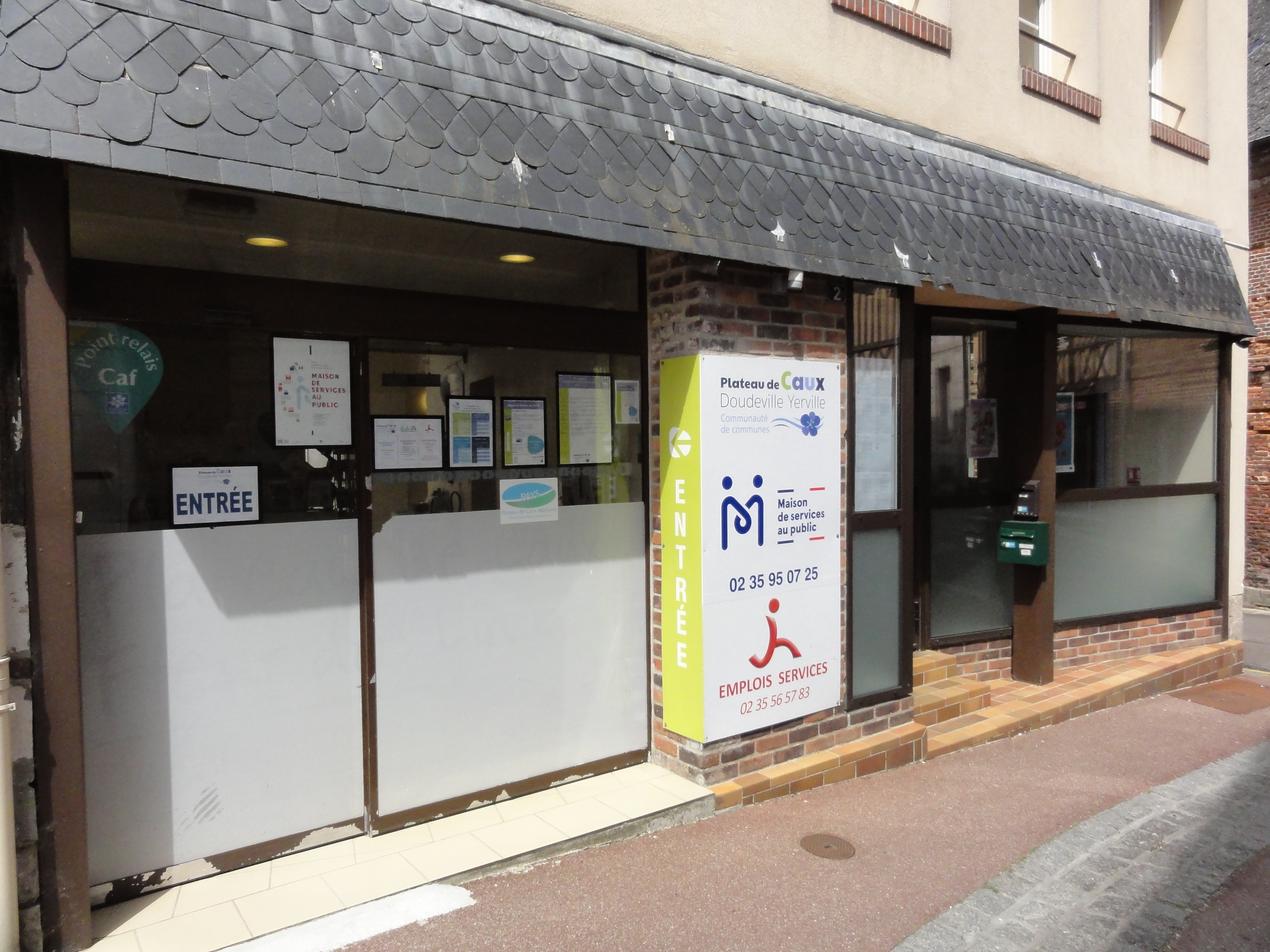 Doudeville (Seine-Mar.) maison de service CdC plateau de Caux